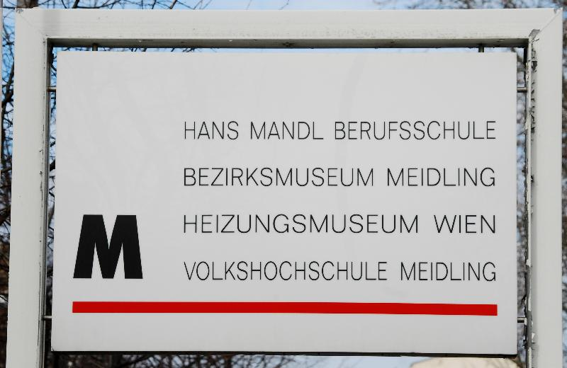 Tafel bei der Hans-Mandl-Berufsschule im 12. Wiener Bezirk